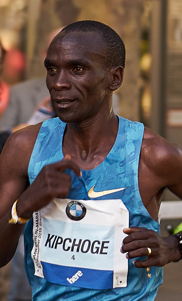 Berlin Marathon 2015 Kipchoge, Eliud (KEN)